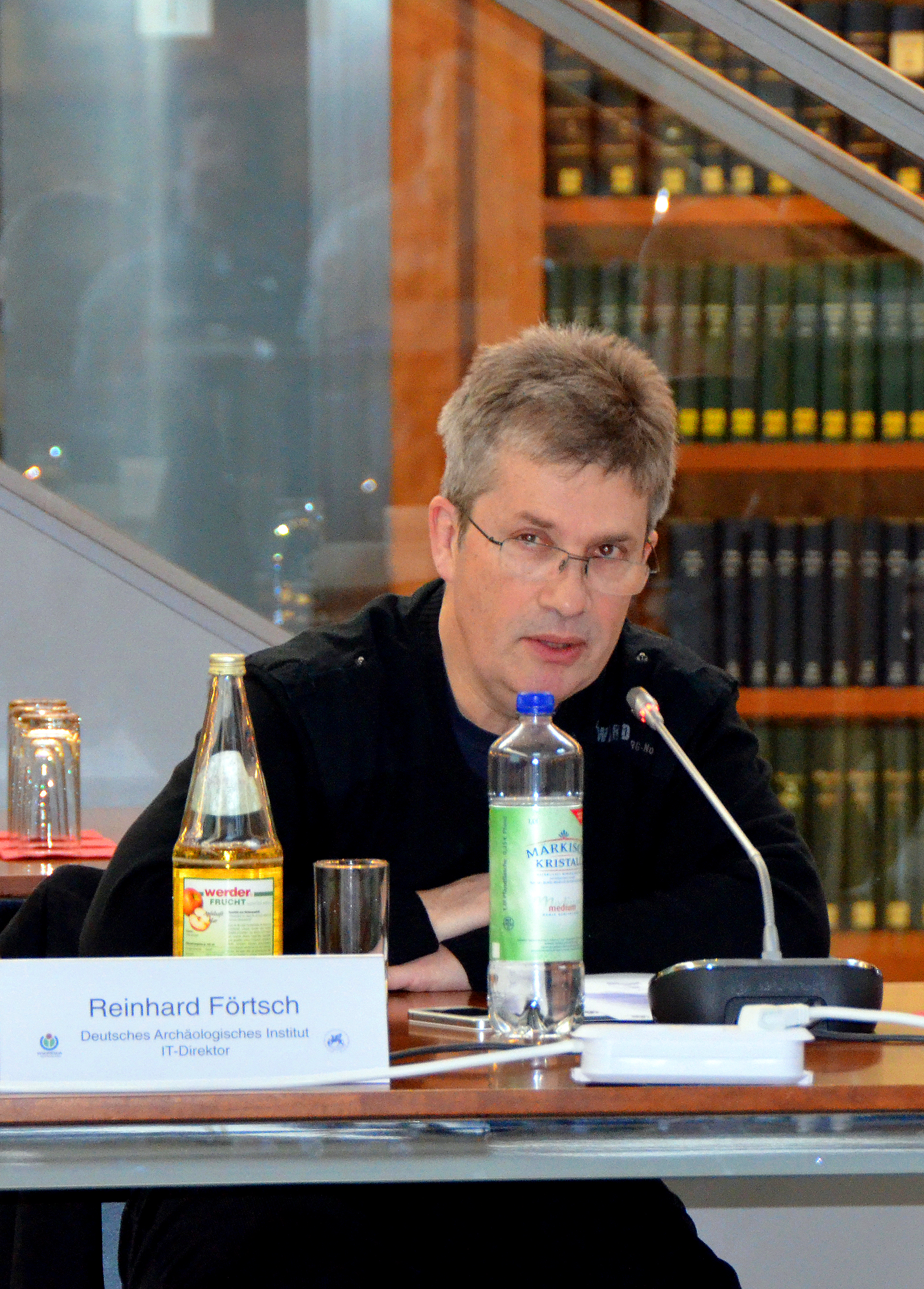 Prof. Dr. Reinhard Förtsch, Deutsches Archäologisches Institut, auf dem Symposium Wikipedia:Wikidata trifft Archäologie 2013 am 16. März 2013 in der Bibliothek des Auswärtigen Amtes der Bundesrepublik Deutschland in Berlin